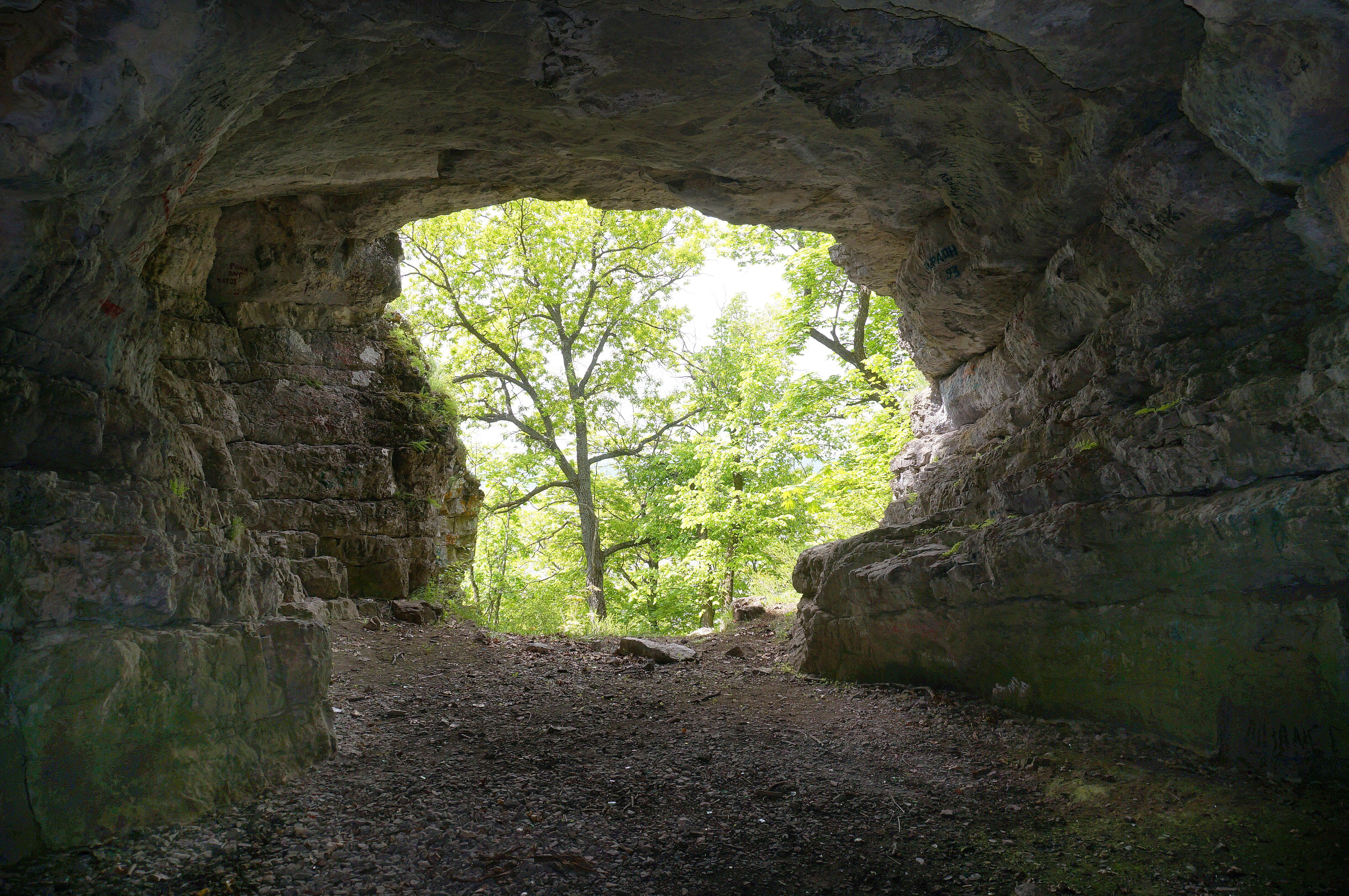 Башкирия: Национальный парк расположен на юго-западных склонах Южного Урала, к западу от водораздельного хребта Уралтау, в юго-восточной части Башкирии,Бурзянский район, Башкортостан This image is related to the protected area of Russia number 0200098